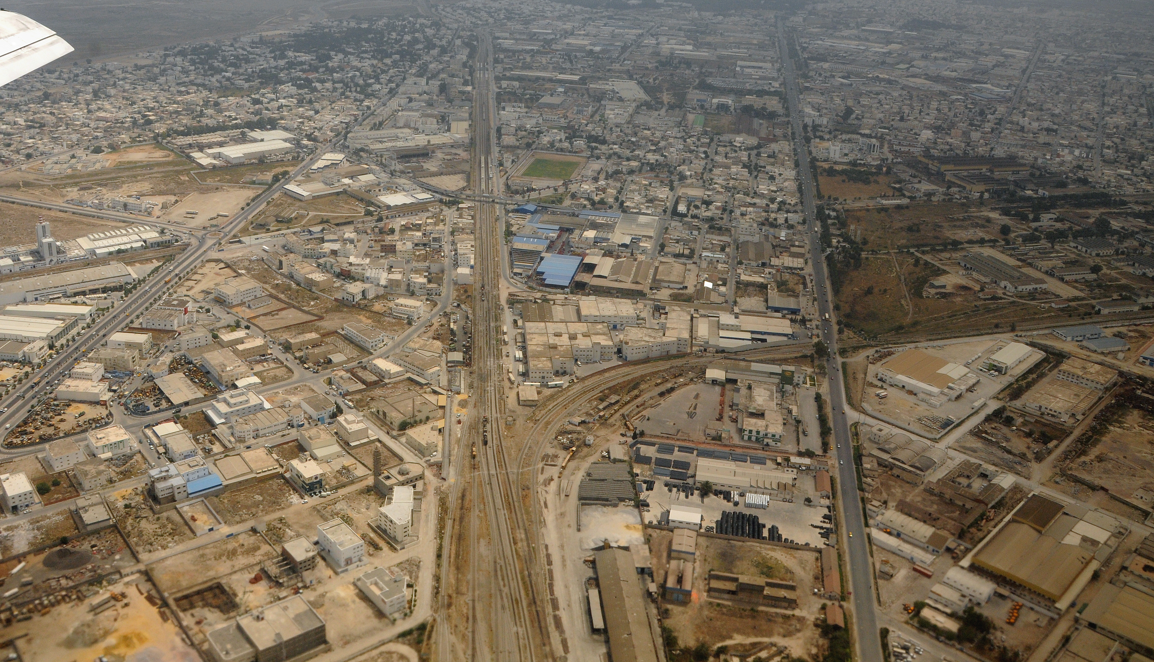 La ville de Mégrine à gauche et Ben Arous à droite, banlieue de Tunis. La route de gauche est celle de Mégrine, celle du milieu est la ligne de chemin de fer du sud. La route de droite est la GP1. Au fond on voit Radès et sa forêt.